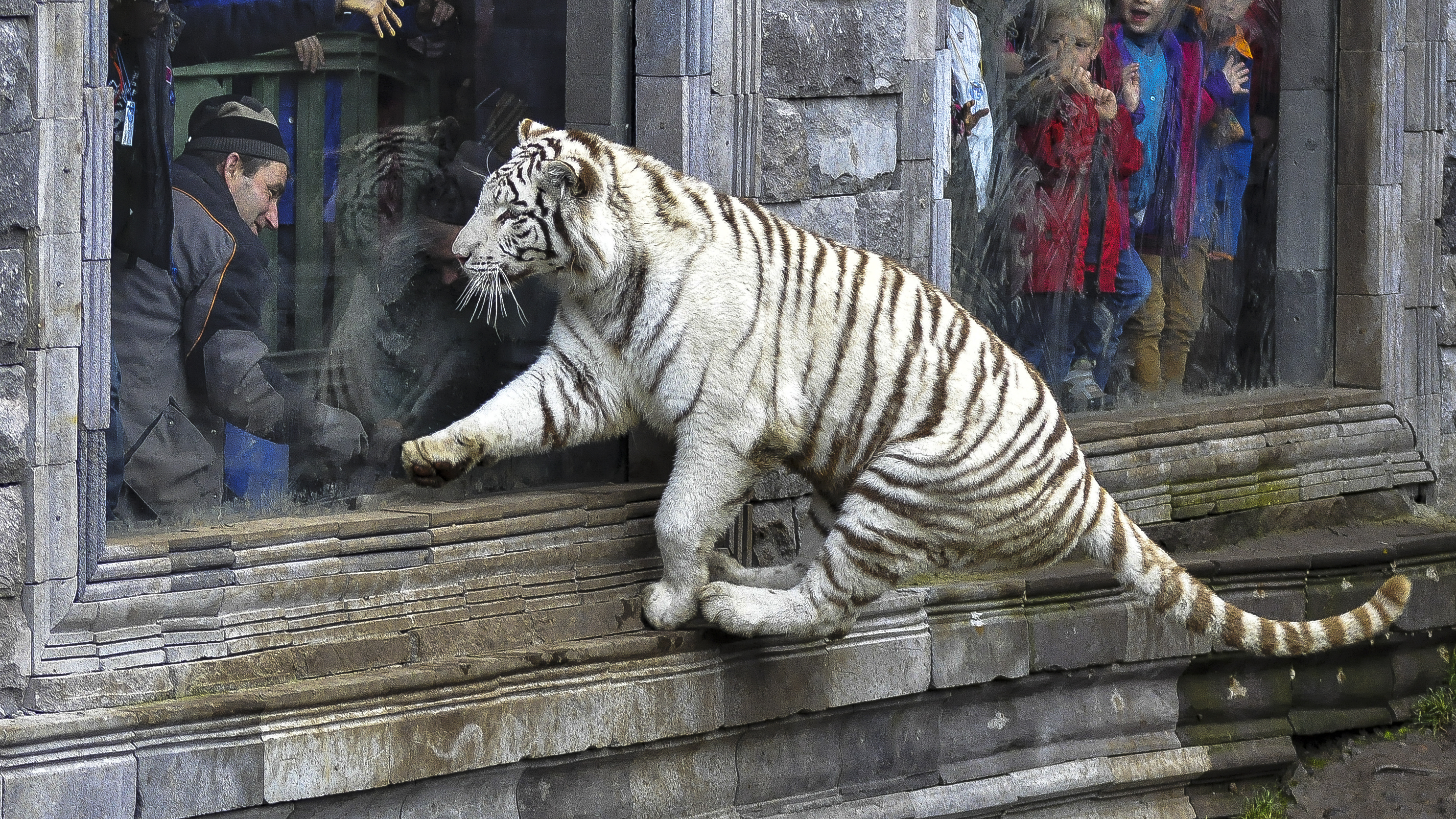 Bengaalse tijger met witte vacht met zwarte of bruine strepen en blauwe ogen door een genetische mutatie (leucisme) - Pairi Daiza, Brugellete België